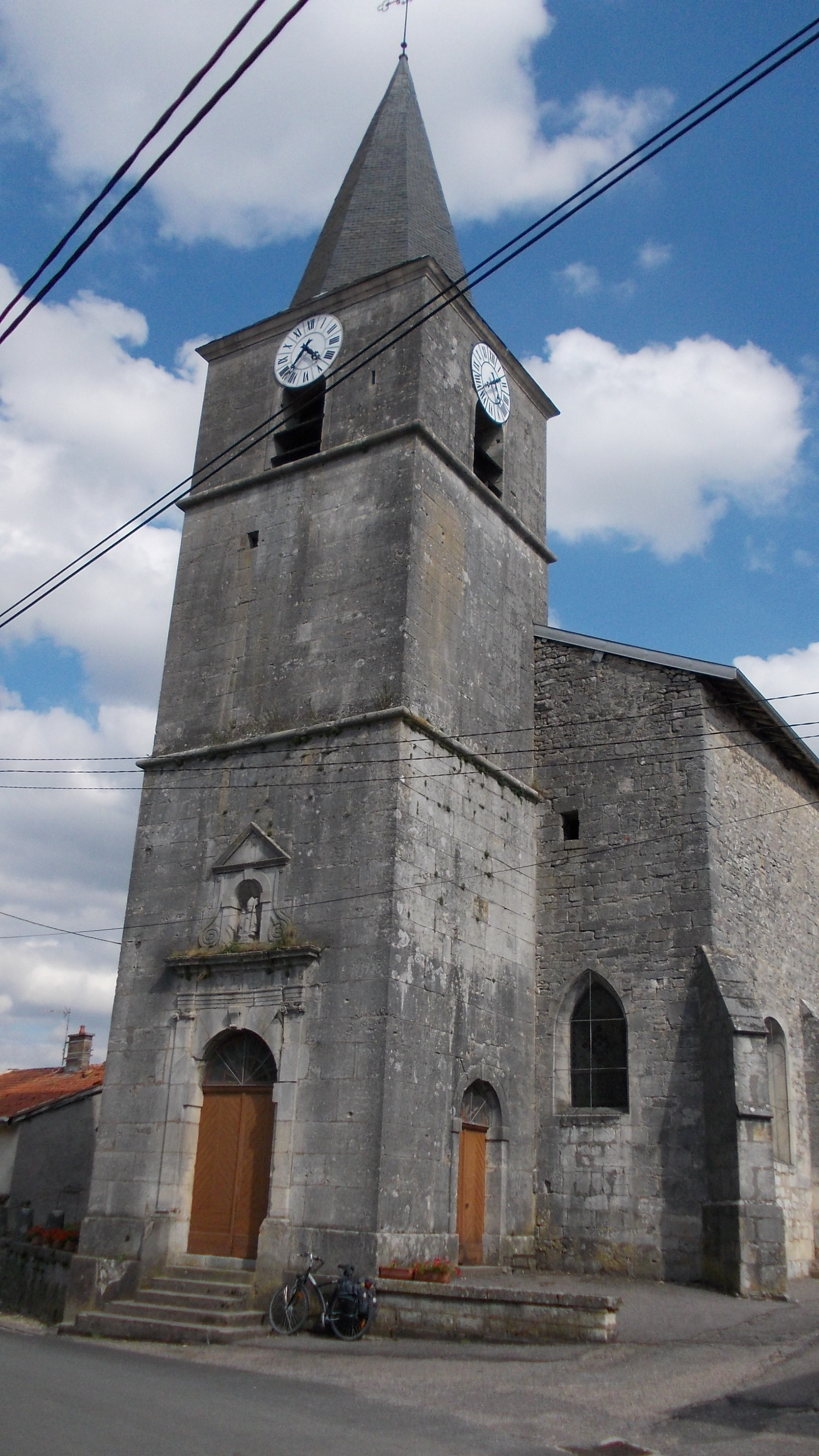 Église de la commune Tréveray